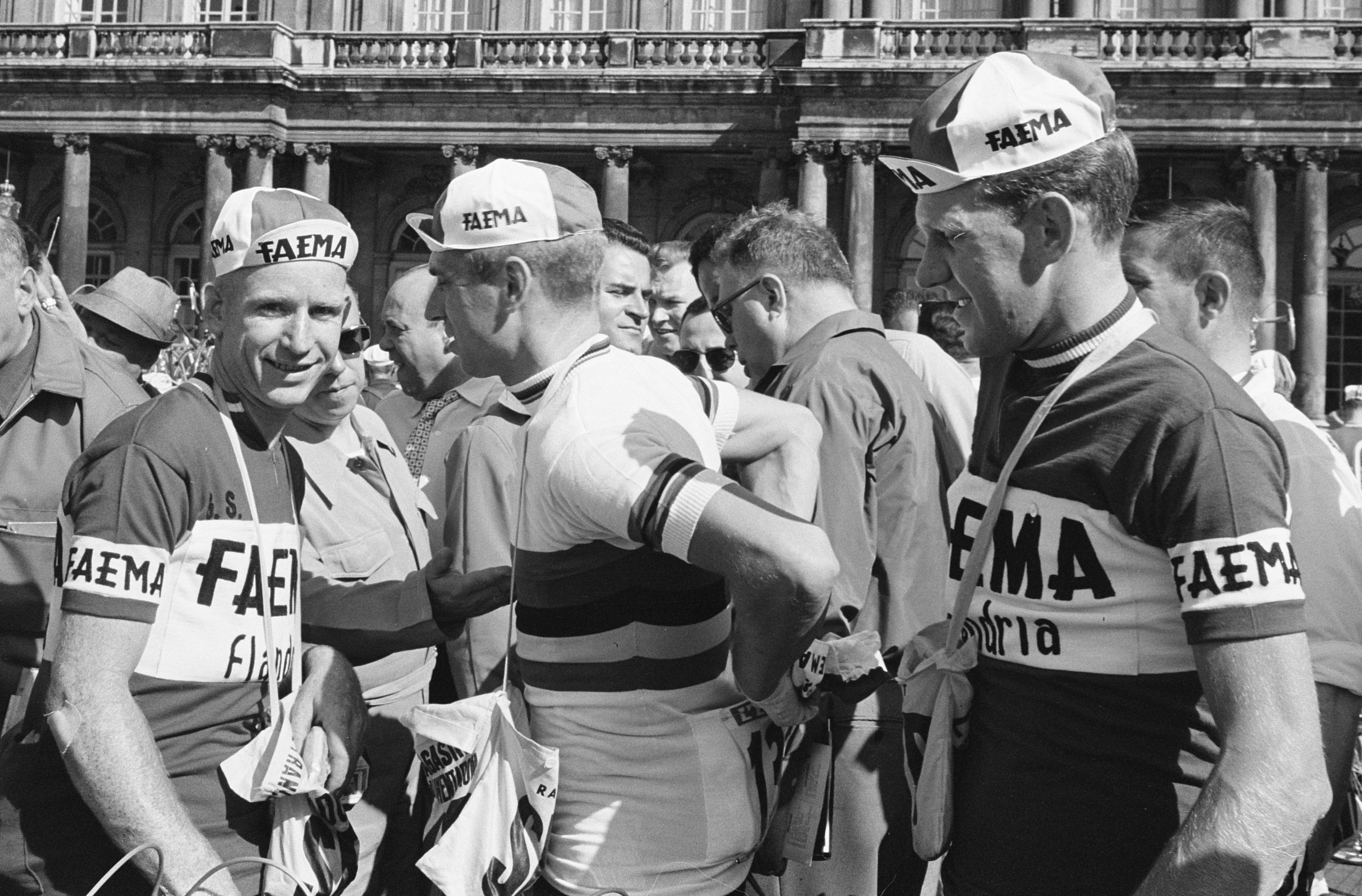 Tour de France 1962 , vlnr. Piet van Est, Rik van Looy en Huub Zilverberg.